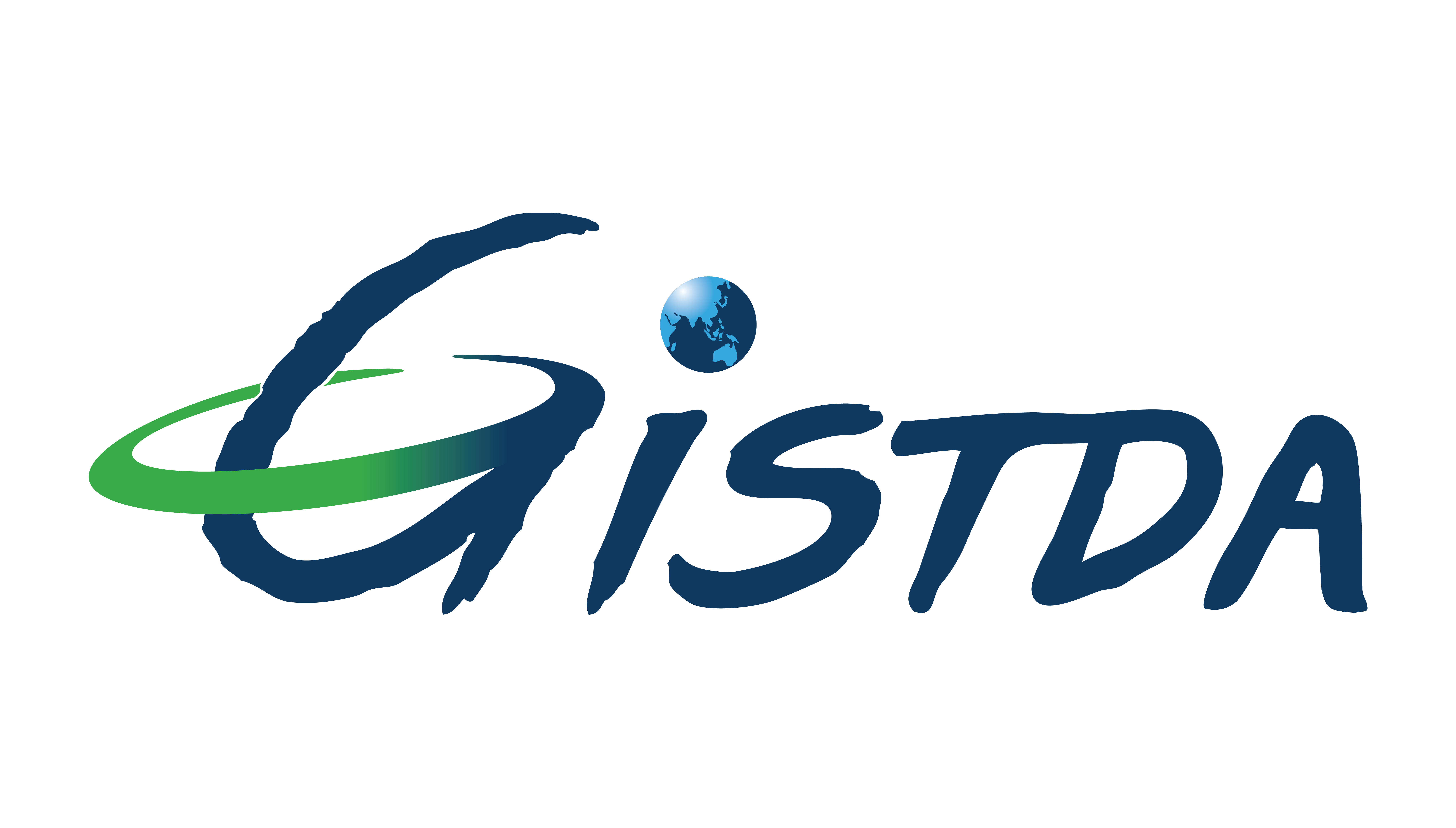 LOGO GISTDA